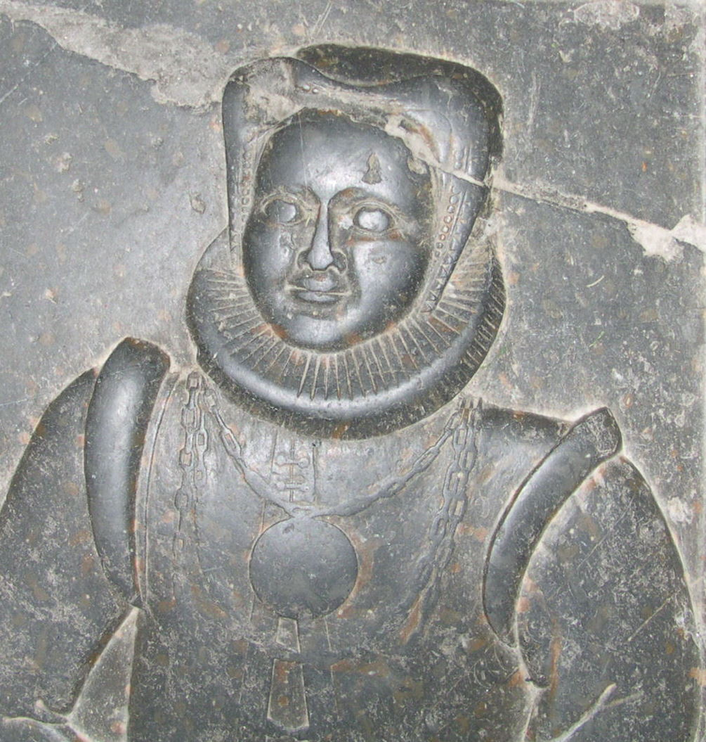 Margrete Breide gravstein i Hedrum kirke